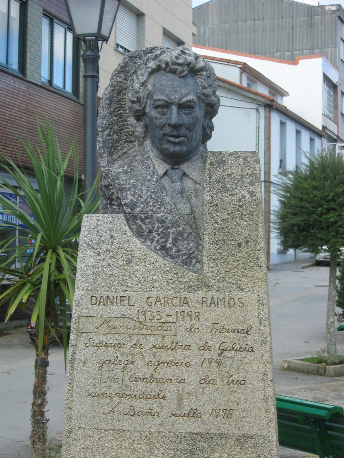 Busto na honra de Daniel García Ramos, xuíz, na súa localidade natal, A Baña (A Coruña)